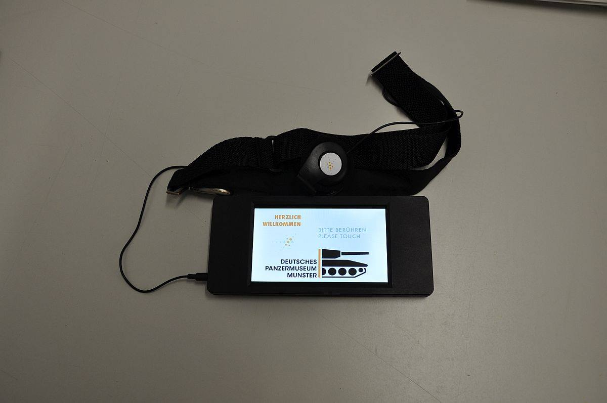 Ein Multirmediagerät, wie es im Deutschen Panzermuseum Munster seit 2014 in Gebrauch ist.